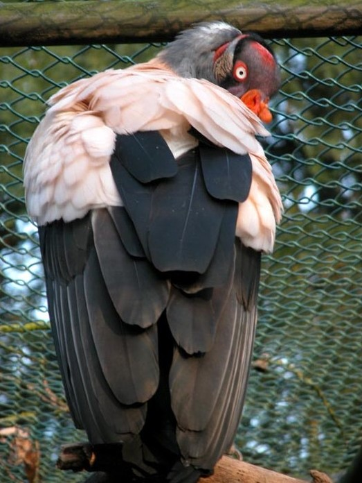 Königsgeier (Sarcoramphus papa)